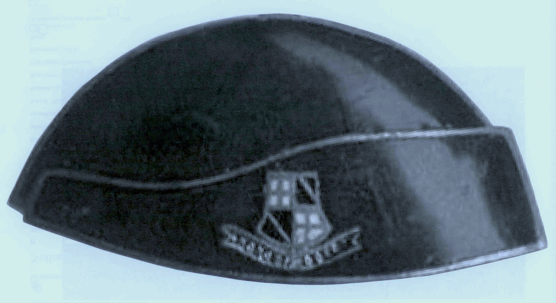 L'orsina, premier chapeau de la Goliardia, créé à Bologne en 1888 en s'inspirant d'un modèle du XVème siècle.